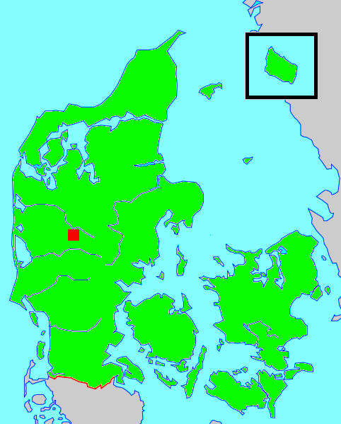 Kort sem sýnir staðsetningu Herning í Danmörku.